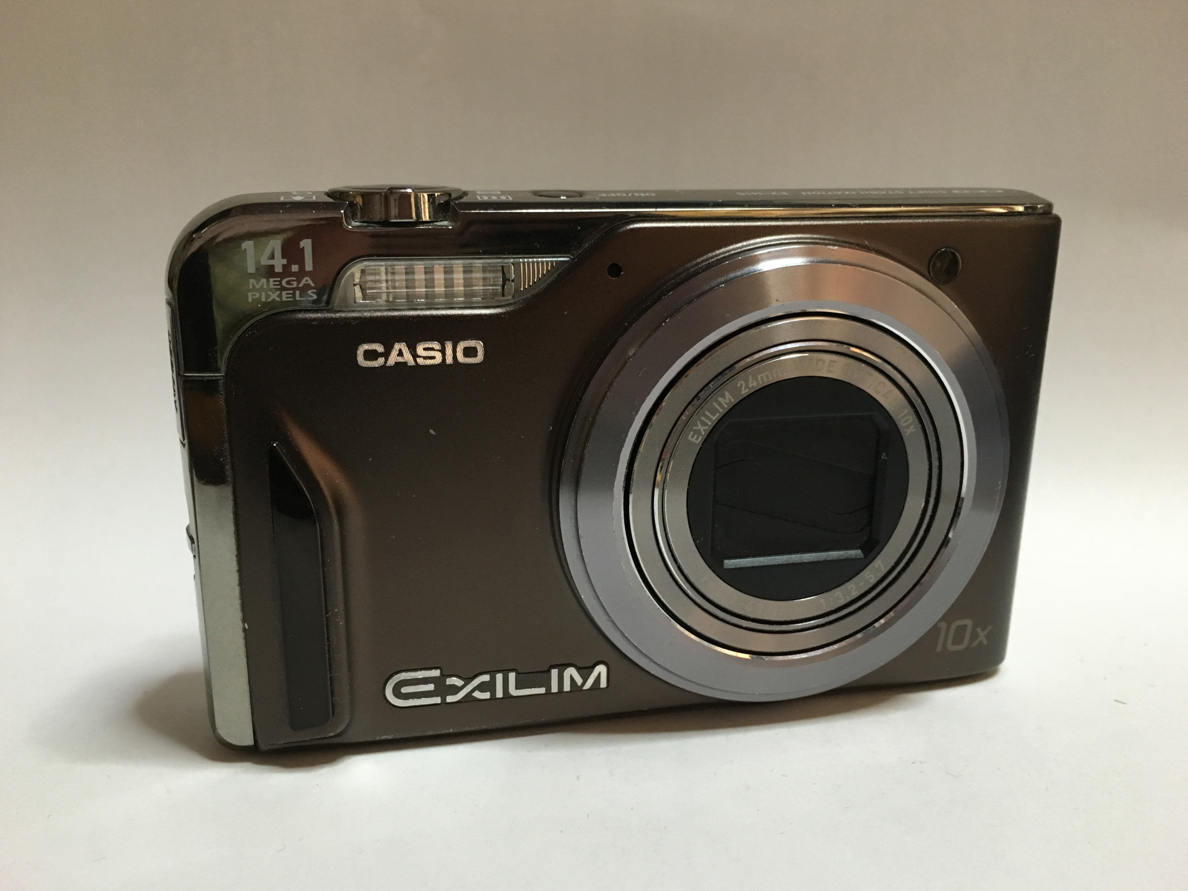 CASIO EXILIM EX-H15BN（ブラウンカラー）の正面